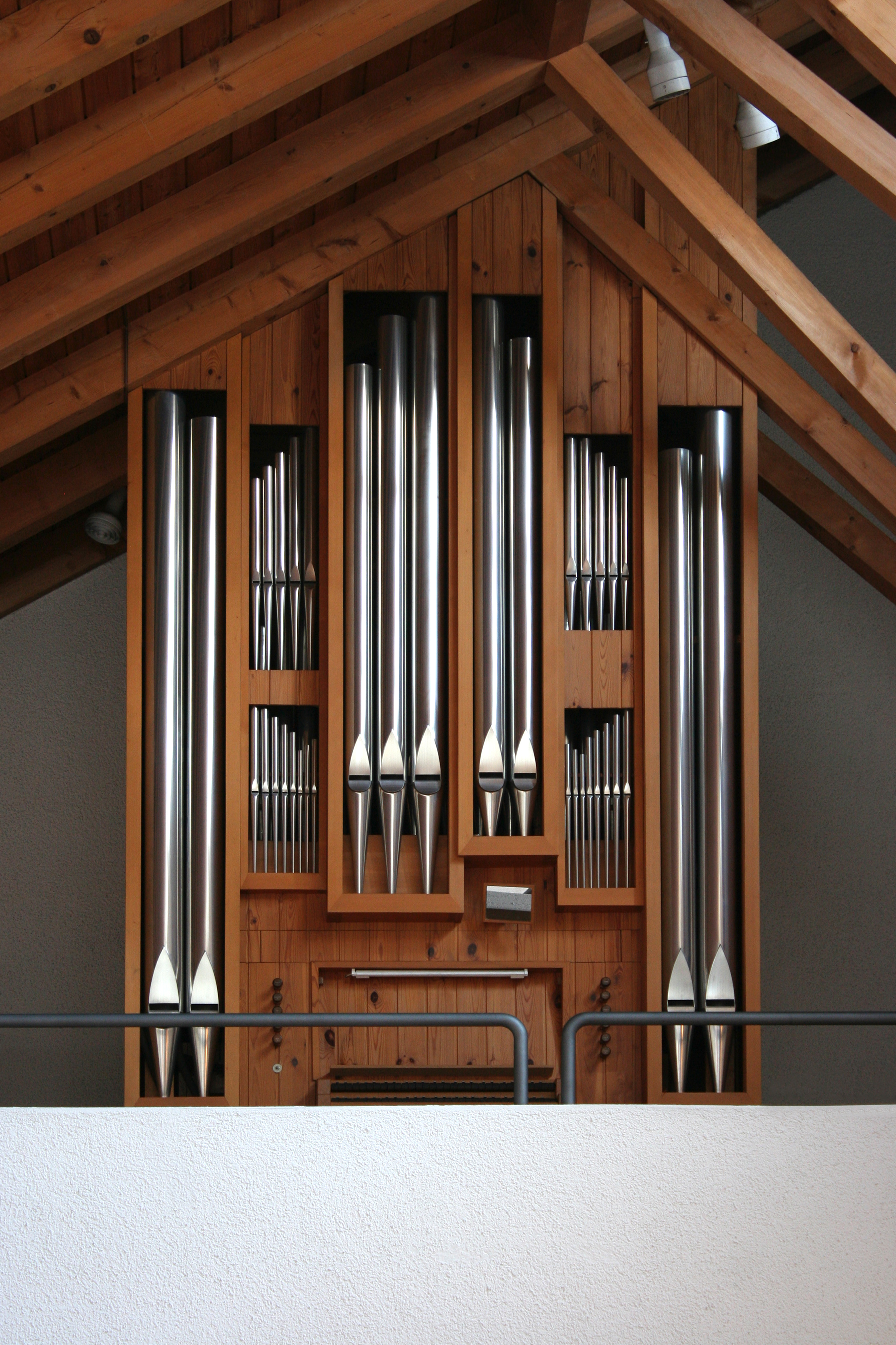 Römisch-katholische Kirche Bruder Klaus Zumikon Orgel